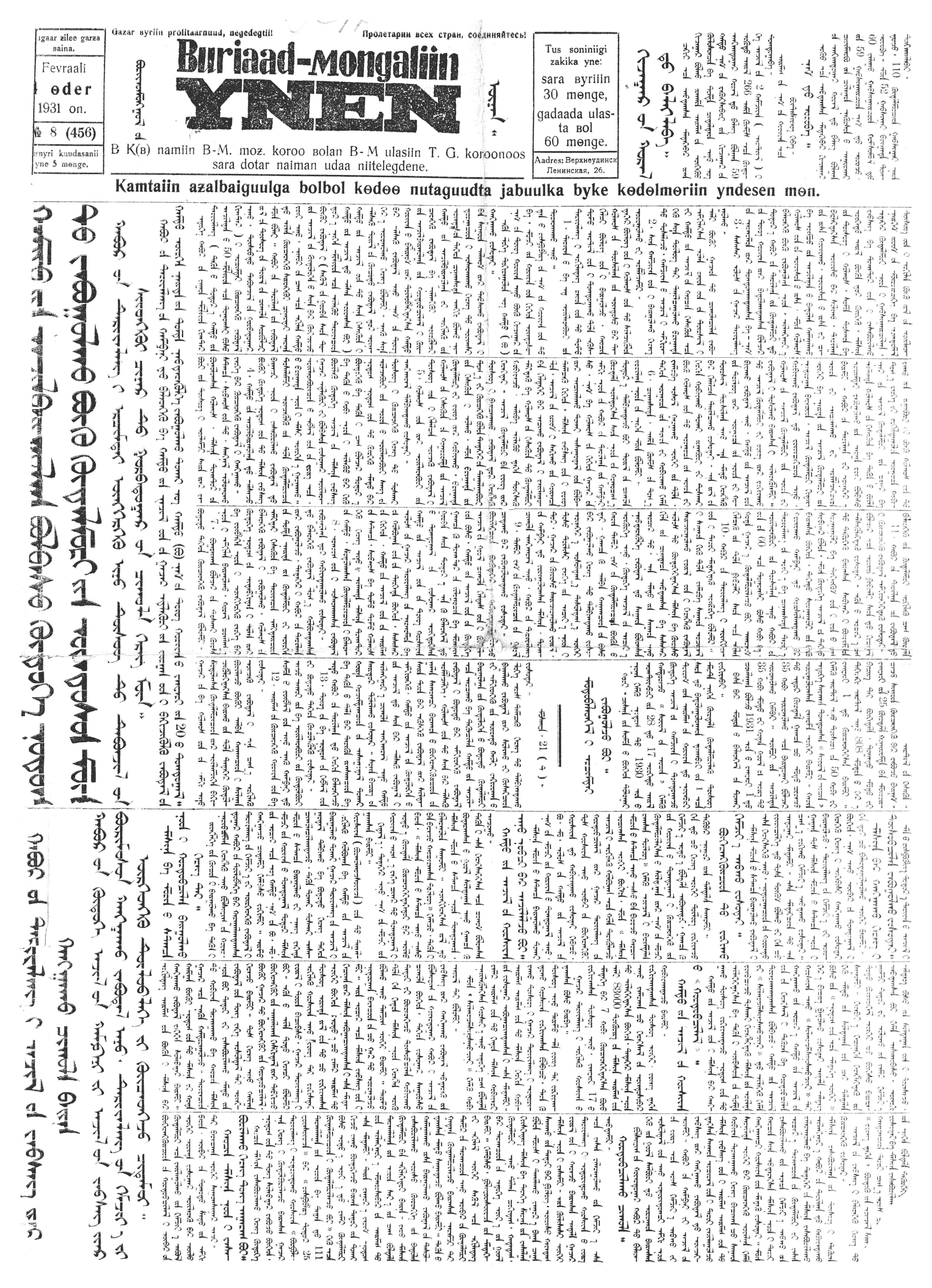 Выпуск Буряад-Монголой Үнэн за 1931-02-04